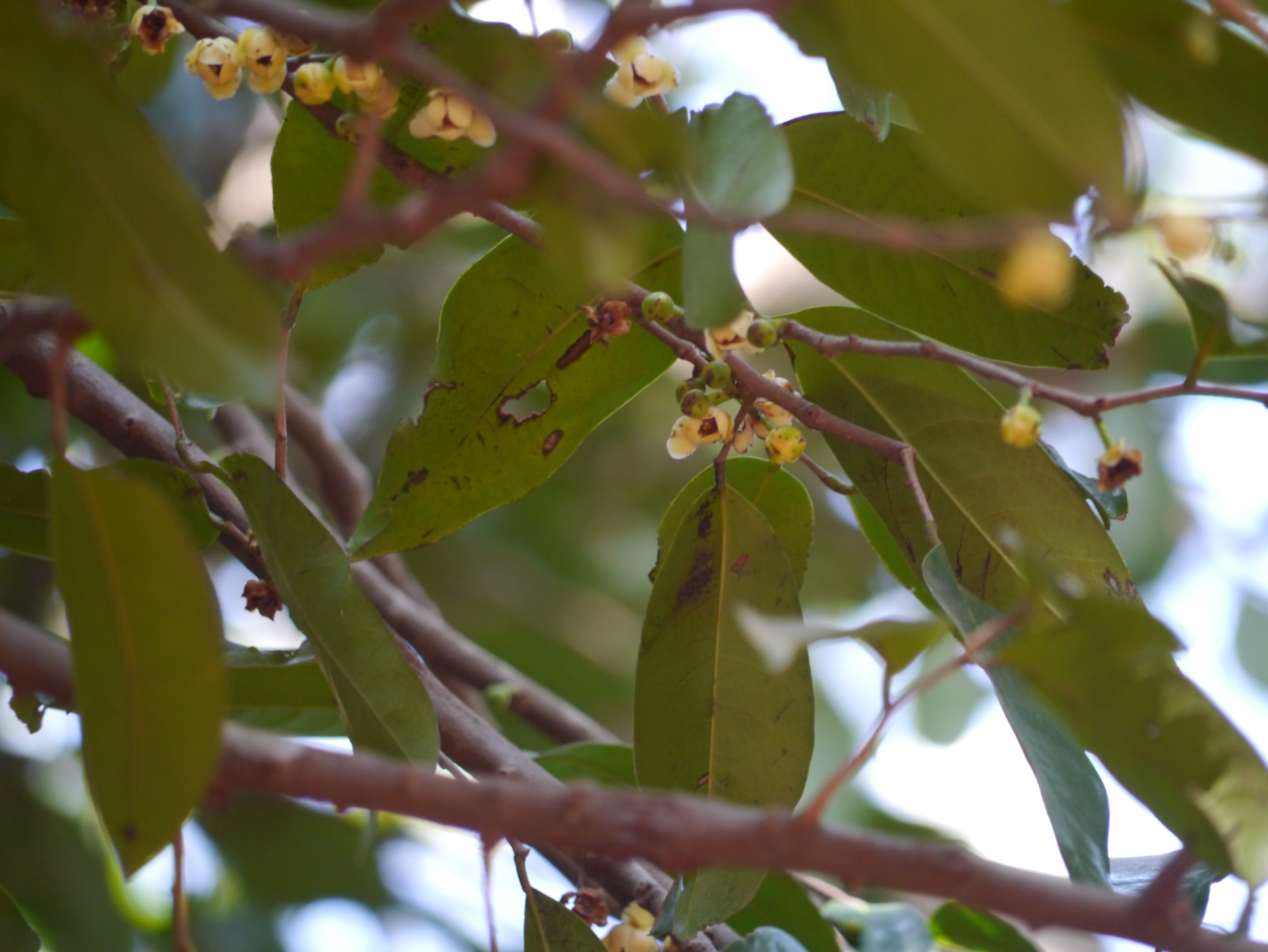 Sageraea laurifolia